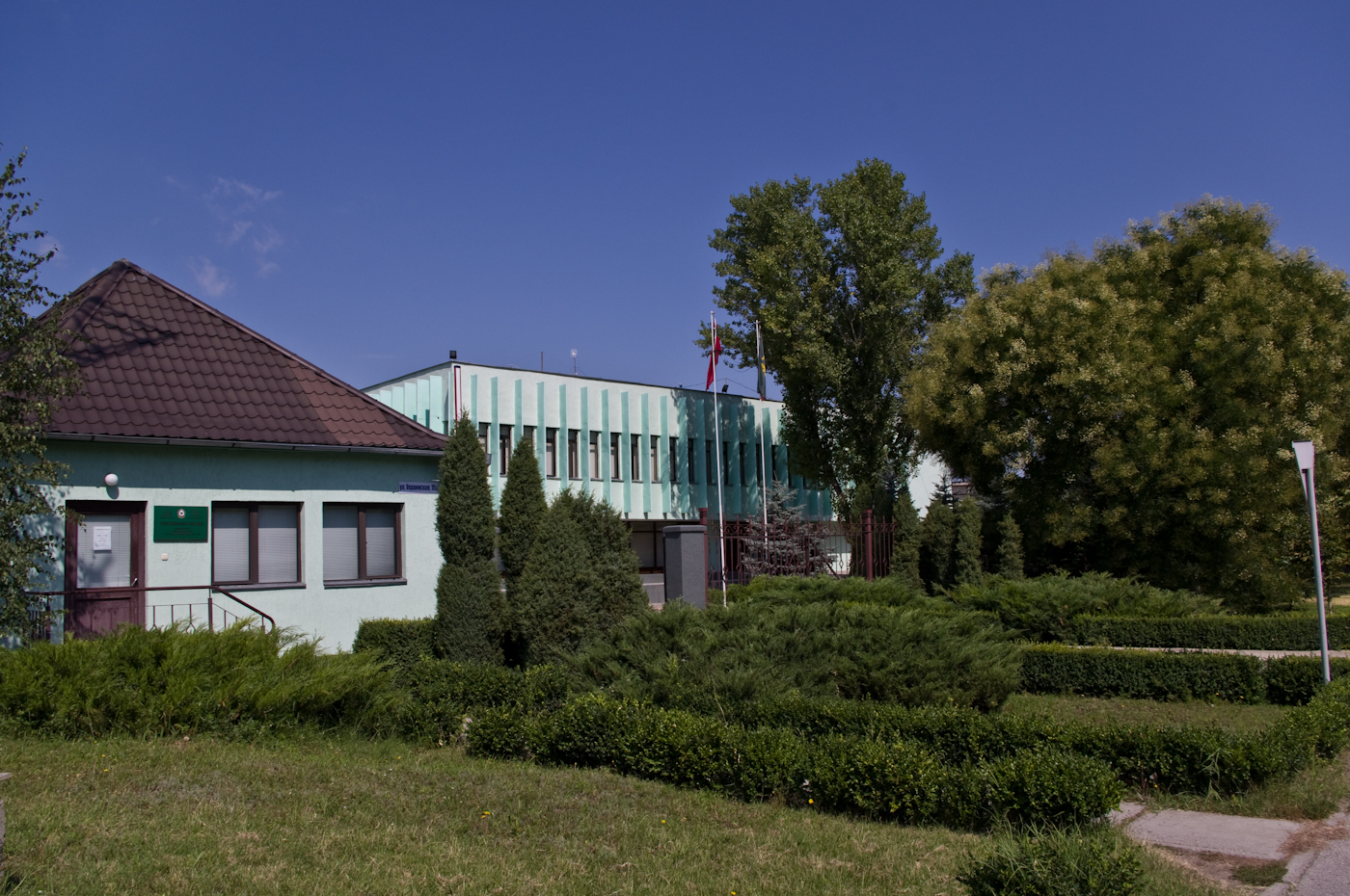 Тираспольская таможня. Улица Украинская 15а